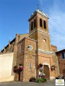 L'église de Réalville (82)a été crée au XVIIème siècle. Elle possède un clocher rond unique.